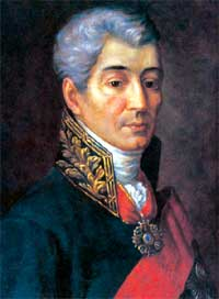 Иван Иванович Дмитриев